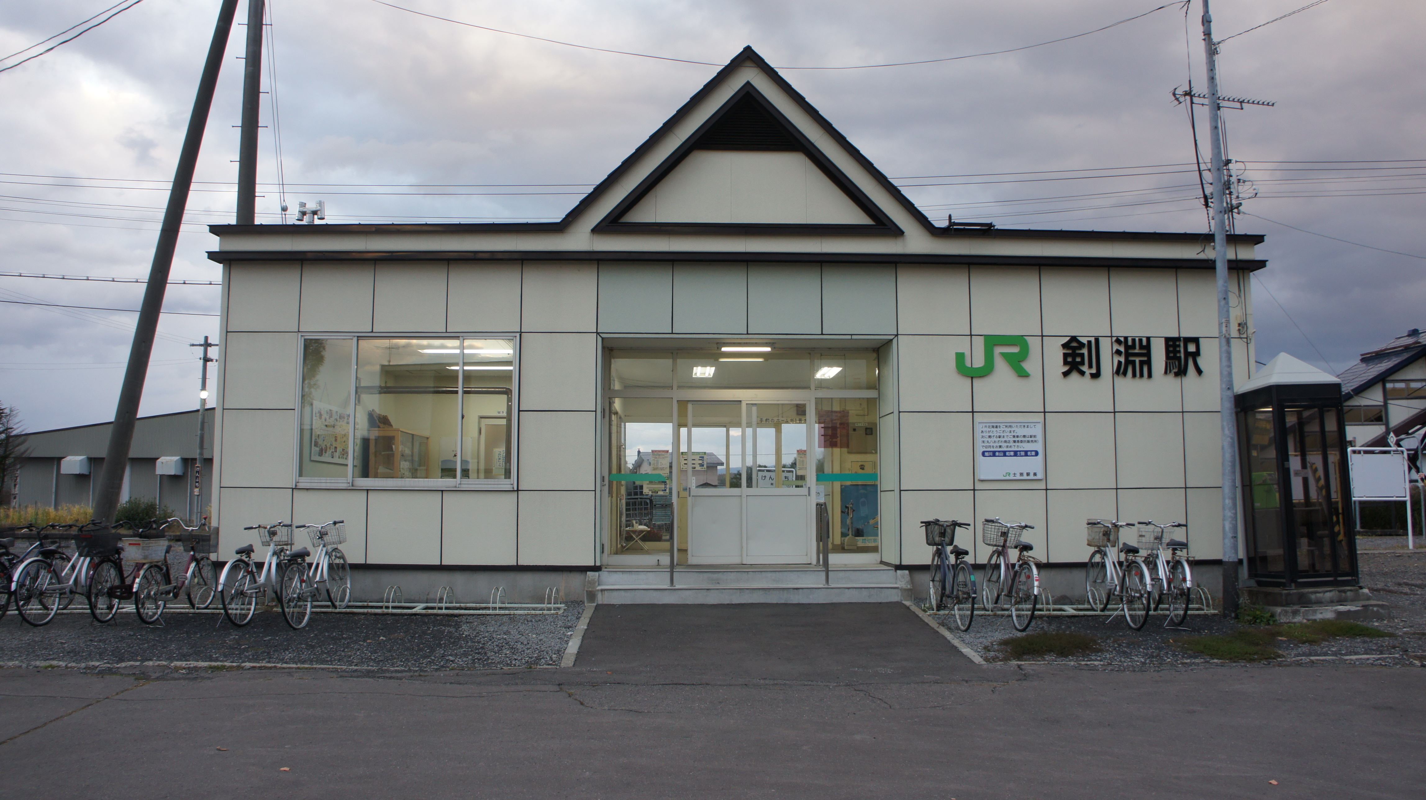 JR宗谷本線・剣淵駅の駅舎 Sony NEX-3